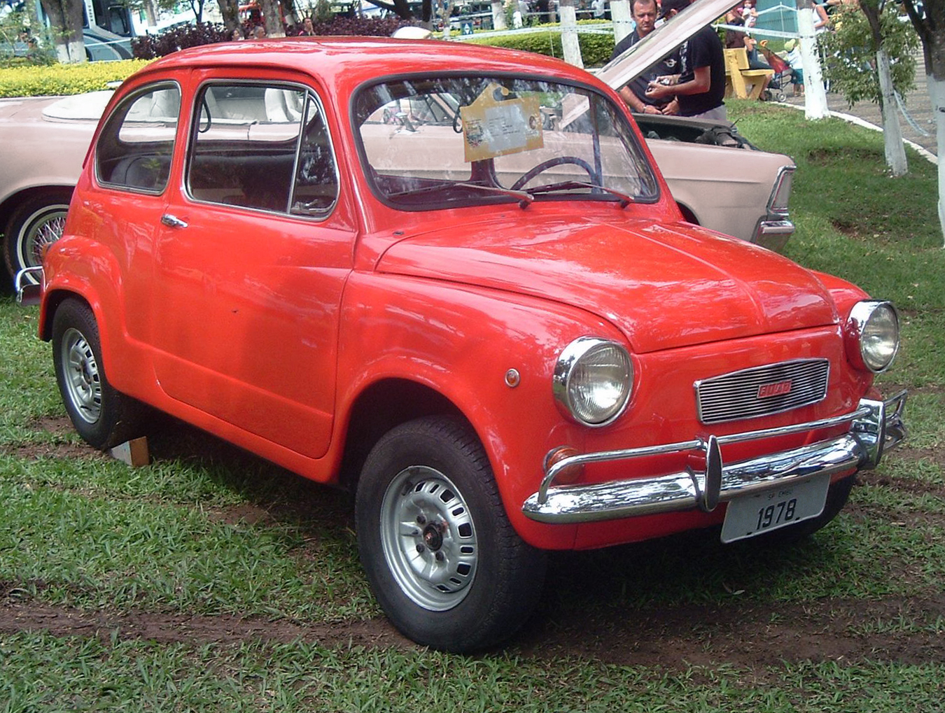 1978 Fiat 600R, Argentinian (or perhaps Uruguayan) built